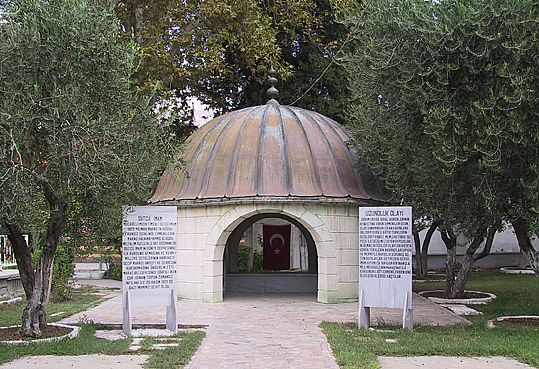 קבר סיטצ'י-אימאם בקרמאנמרש